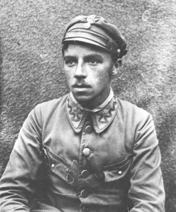 Tadeusz Münnich podporucznik I Brygada Legionów